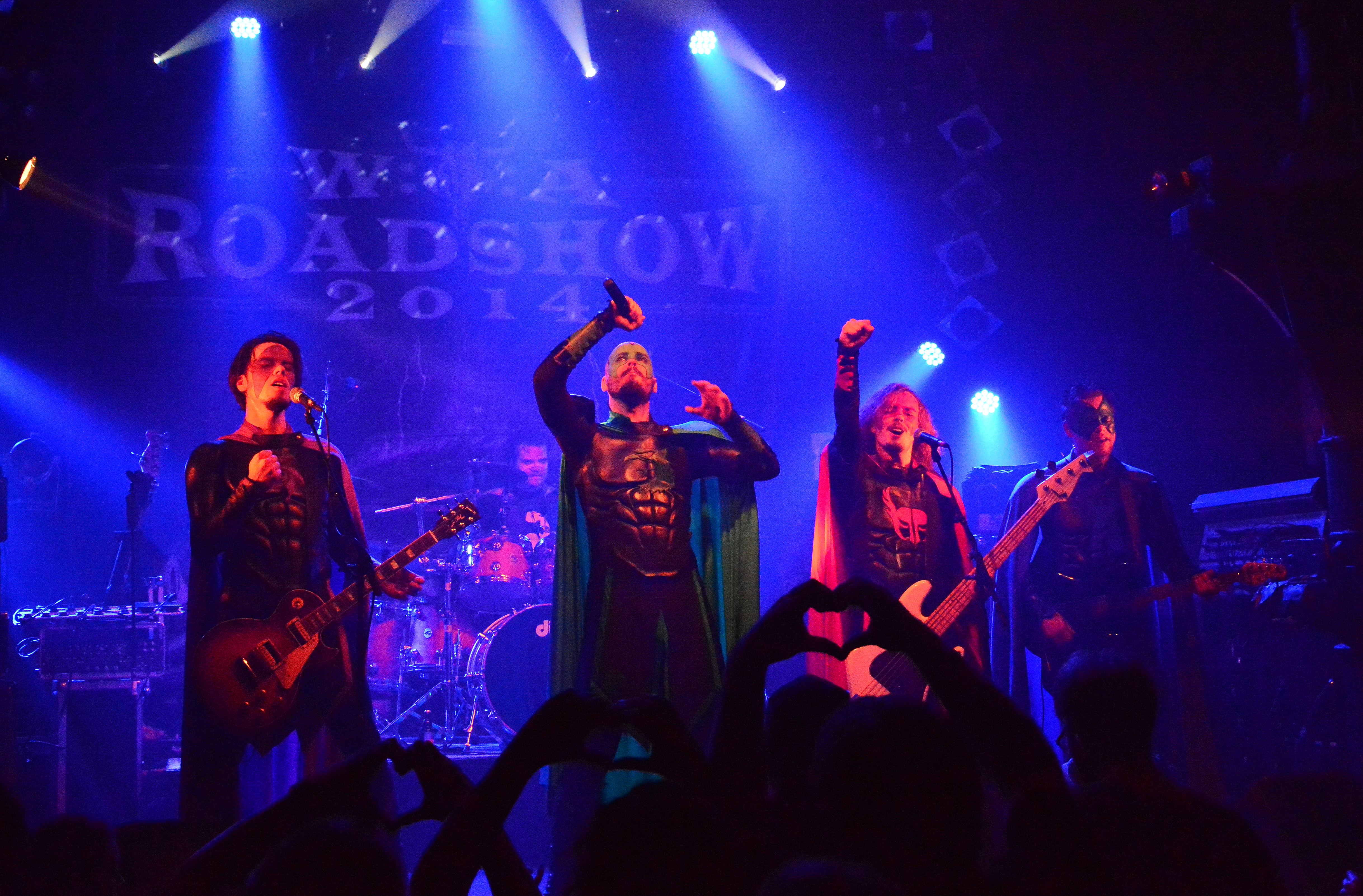 Grailnights bei der Wacken Roadshow 2014 im Hamburger Knust